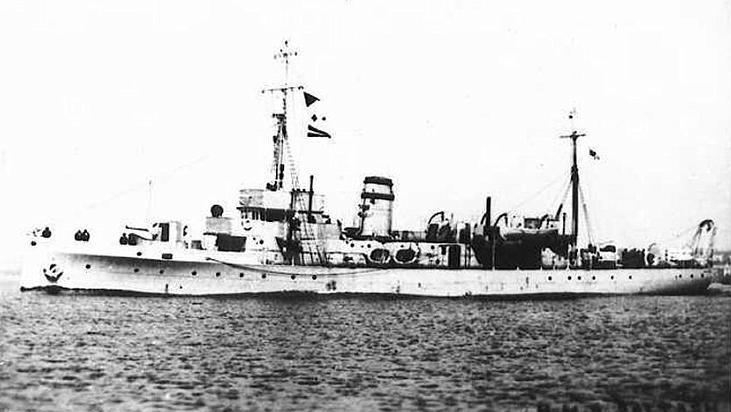 Der britische Minensucher Saltash